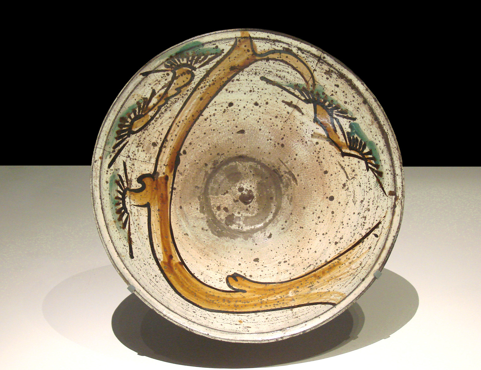 Plat (konebachi) avec motif de branche de pin 18-19ème siècle, Yumino, préfecture de Saga, Japon poterie Mingeikan, Tokyo dans l'exposition "L'esprit Mingei au Japon, de l'art populaire au design"